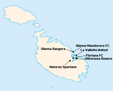 Répartition des clubs en First Division Maltaise 1922-1923.